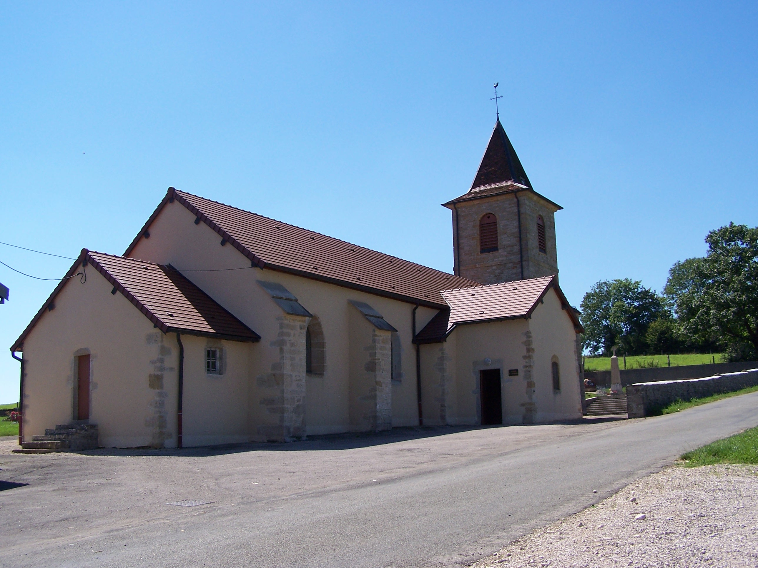 Photo de la mairie de Pimorin (Jura)